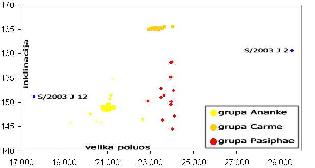 Jupiterovi retrogradni nepravilni sateliti (stanje listopad 2005) - inklinacija vs velika poluos